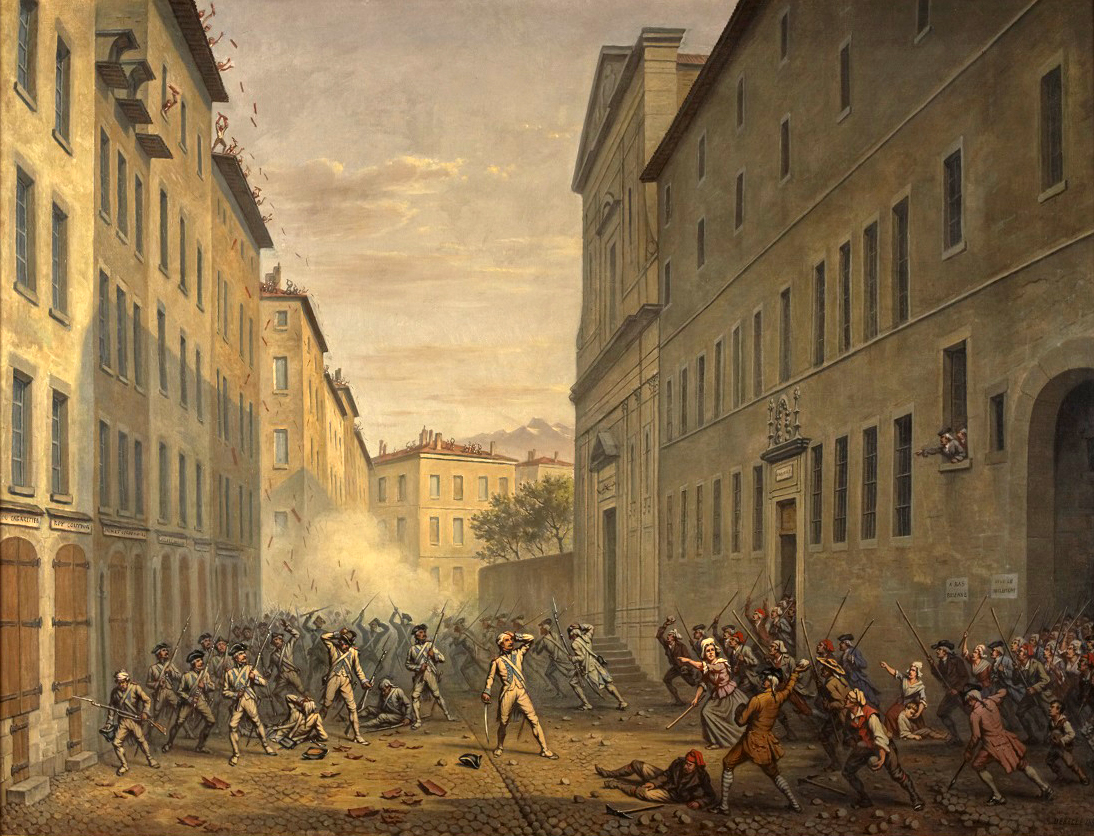 Sous l’Ancien Régime, les plus hautes instances administratives étaient les Parlements qui pouvaient refuser d’approuver une nouvelle loi, obligeant alors le roi à faire procéder à leur enregistrement forcé par lettre de cachet. Dans le contexte de crise économique et sociale des années 1780, ils incarnent pour une partie de l’opinion publique, la résistance au “despotisme” monarchique. Le 10 mai 1788, paraît une série d’édits qui limitent leurs attributions, suscitant une vive agitation. Malgré de dramatiques protestations et des émeutes populaires, les parlementaires s’inclinent dans toutes les villes du royaume. Mais à Grenoble, le 7 juin 1788, en réponse au décret d’exil qui frappe son Parlement, la population se mobilise, empêche le départ des magistrats et, à partir des toits, lance des projectiles sur les troupes royales qui se retirent : c’est la fameuse journée des Tuiles.